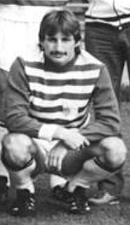 Title: Mannschaftsfoto FC Carl Zeiss Jena Factual corrections and alternative descriptions are encouraged separately from the original description. Additionally errors can be reported at this page to inform the Bundesarchiv. Original historic description: ADN-ZB-Kasper-16.9.83-zin-Bez. Gera: Die Mannschaft des FC Carl Zeiss Jena für die Fußball-Oberligasaison 1983-84. Vorn v.l.n.r. Matthias Pittelkow, Wolfgang Schilling, Robby Zimmermann, Konrad Weise, Andreas Krause, Gert Brauer und Thomas Töpfer. Mitte stehend v.l.n.r.: Trainer Hans Meyer, Jürgen Köberlein, STefan Meixner, Torhüter Karsten Härtel, Torhüter Hans-Ullrich Grapenthin, Torhüter Perry Bräutigam, Heiko Peschke, Martin Trocha und Trainer Helmut Stein. Hinten stehend v.l.n.r.: Thomas Ludwig, Jürgen Raab, Andreas Bielau, Gerhard Hoppe, Mannschaftskapitän Rüdiger Schnuphase und Jörg Burow. Die Jenaer Elf erreichte im Hinspiel der 1. Runde des Fußball-UEFA-Pokals am 13.9.83 bei IB Veastmannayejar in Reykjavik ein 0:0 und empfängt die Isländer am 28.9.83 zum Rückspiel im heimischen Ernst-Abbe-Sportfeld.